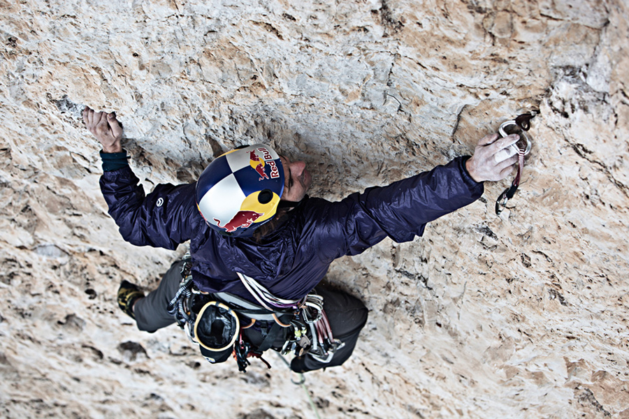 Eneko escalando en Dolomitas